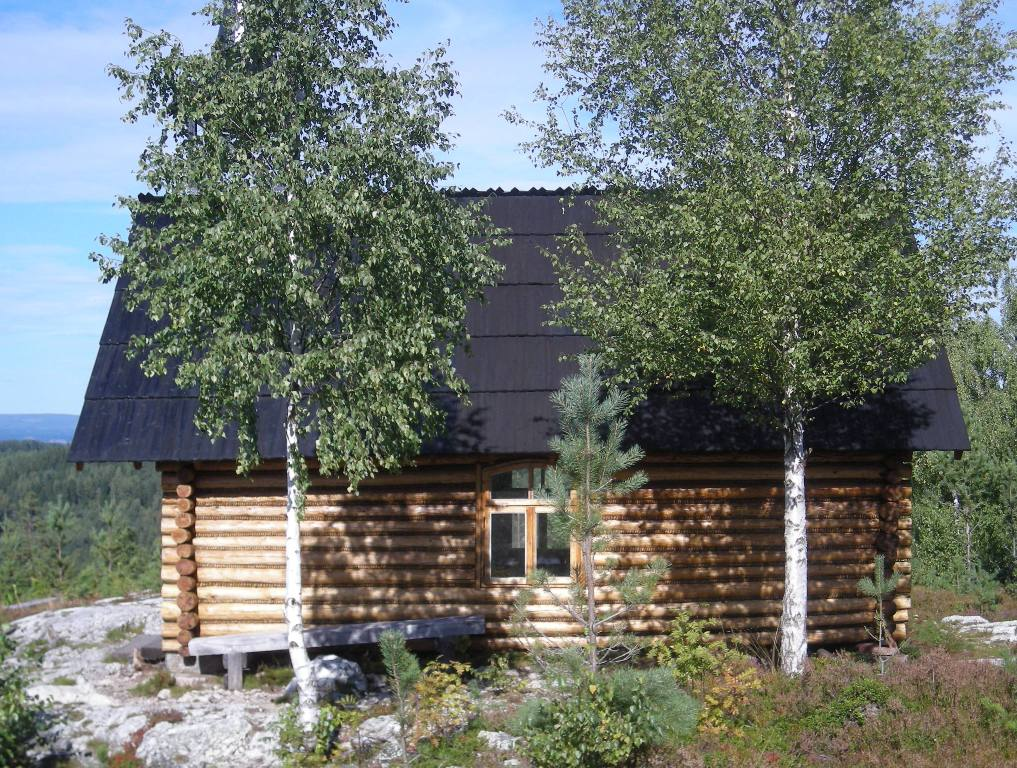 Skåråsberget skogskapell, Vallset